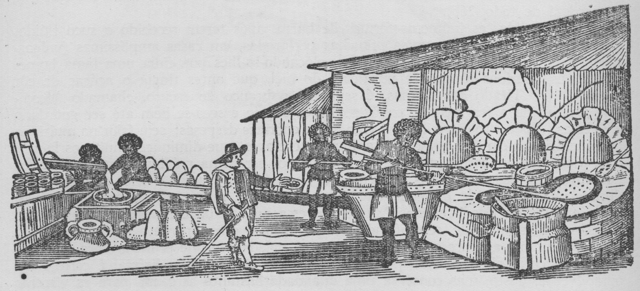 Fabricação do açúcar e rapadura, image in Historia Naturalis Brasiliae, of Guilherme Piso (Guilielmi Pisonis), dedicate to Johann Moritz Fürst von Nassau-Siegen.